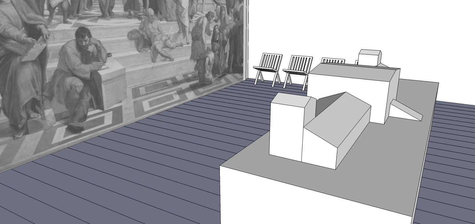 Vista prospettica della sala mostra Architettura-Idea, progettata da Luca Meda e presentata all'interno della mostra Il progetto di architettura alla XVI edizione della Triennale di Milano